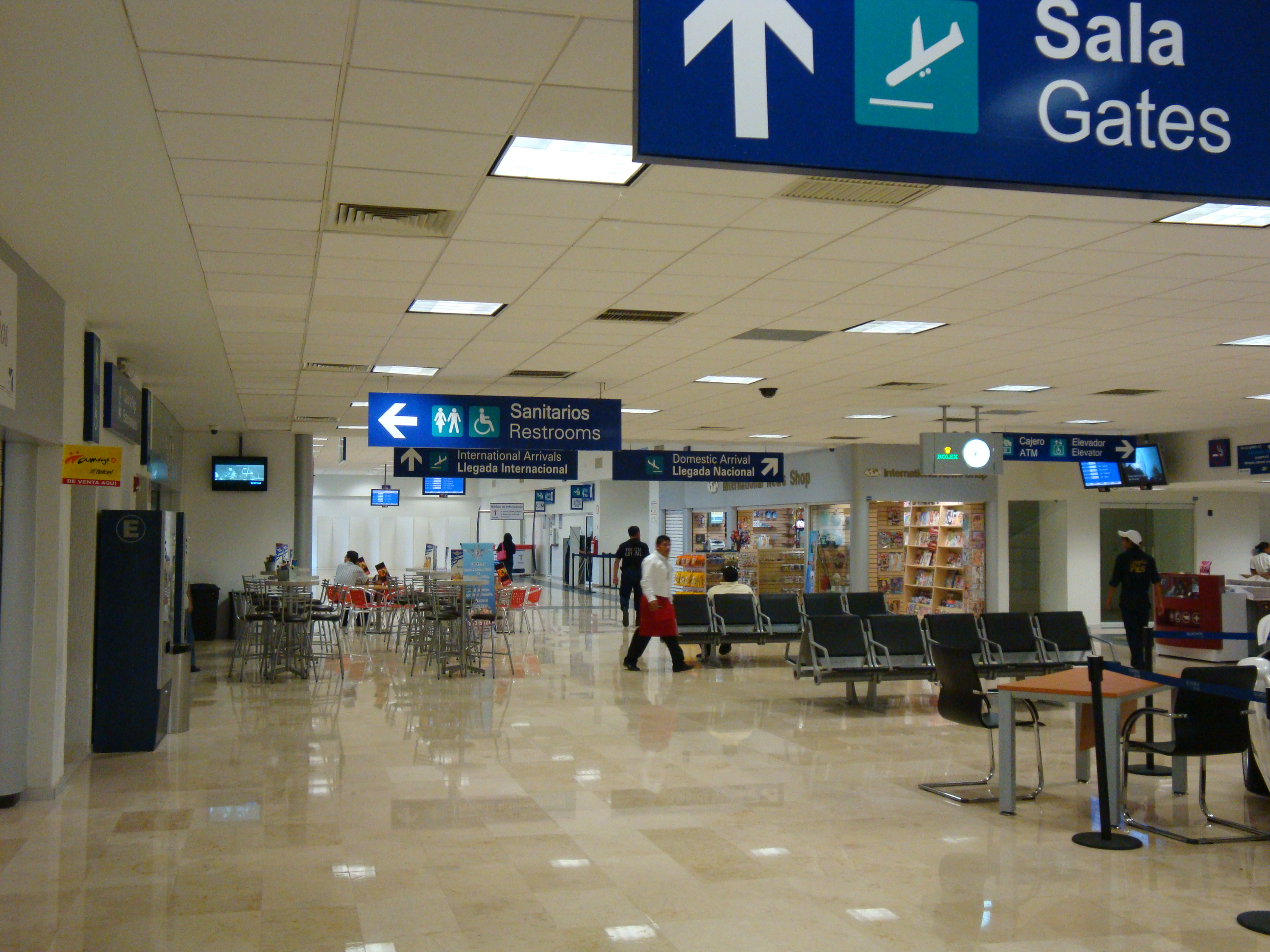 Sala de llegada nacional e internacional en la planta baja del Aeropuerto Internacional de Villahermosa, Tabasco, México.